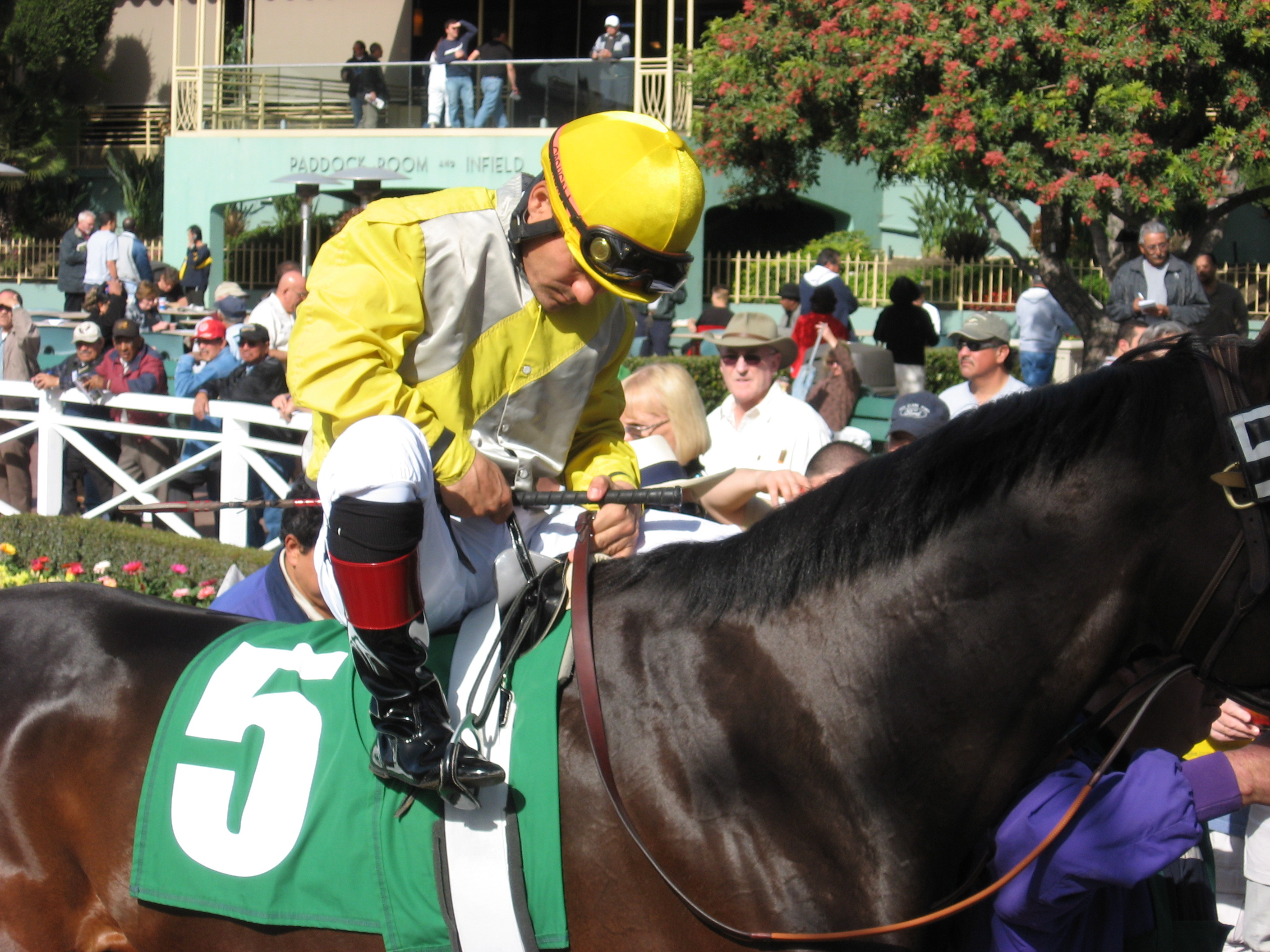 騎乗中のナカタニ.